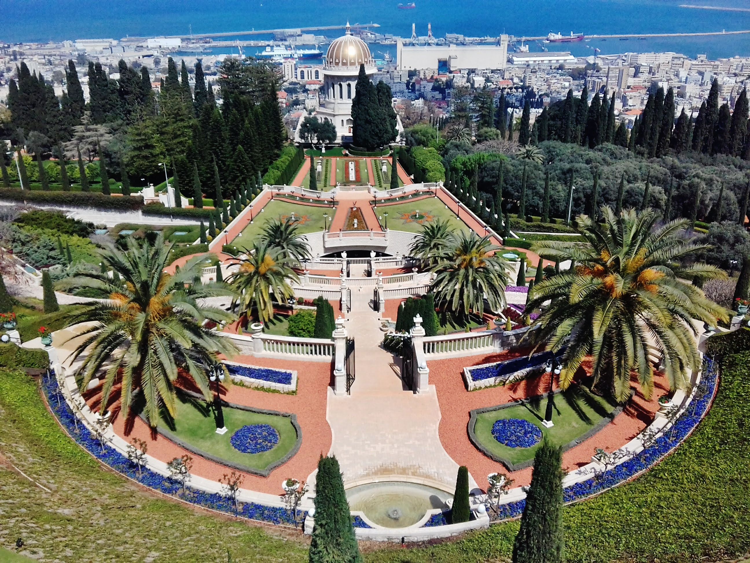 Terrasların aşşağı hissəsi